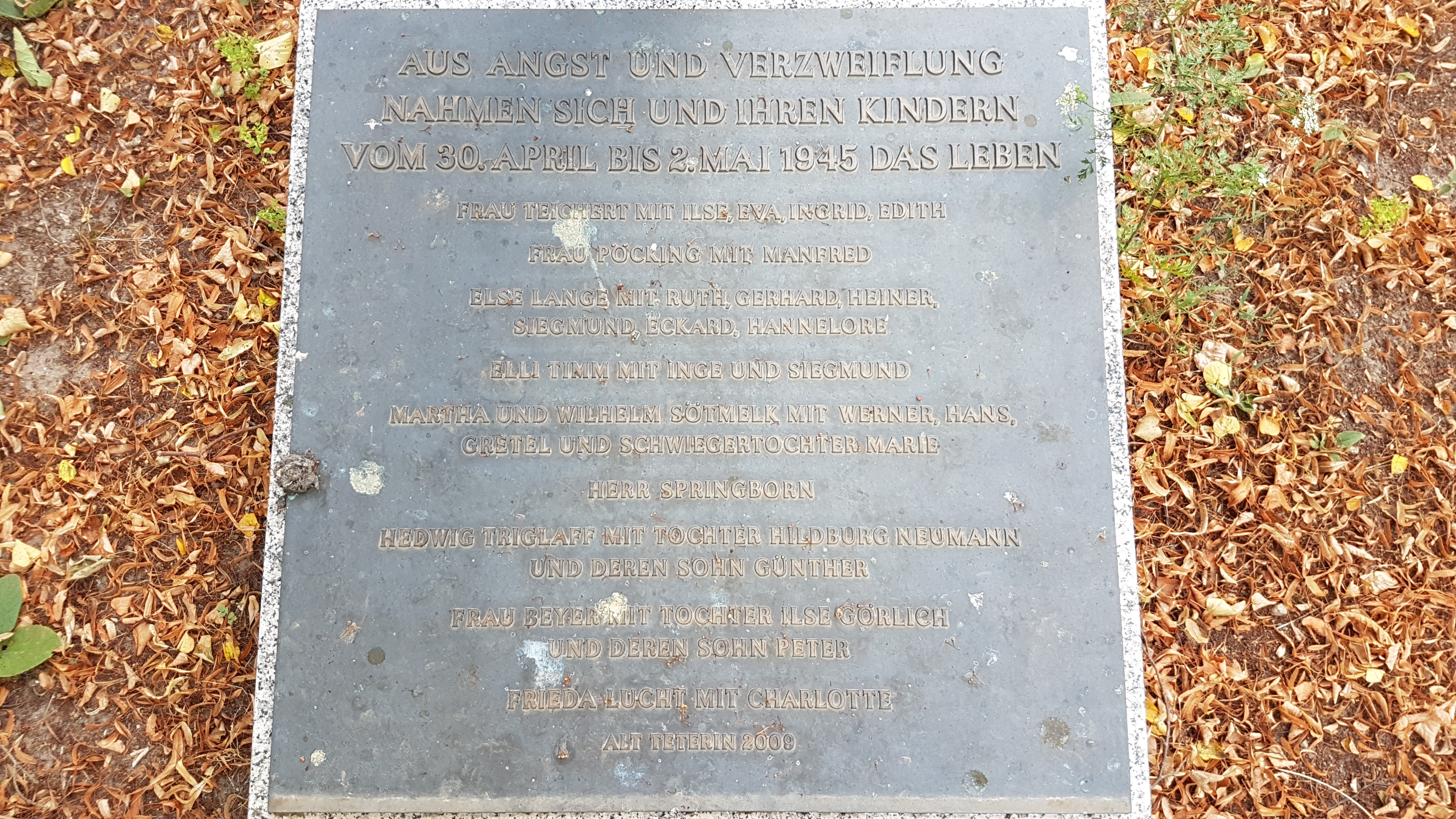 Gedenktafel auf dem Tramstower Friedhof